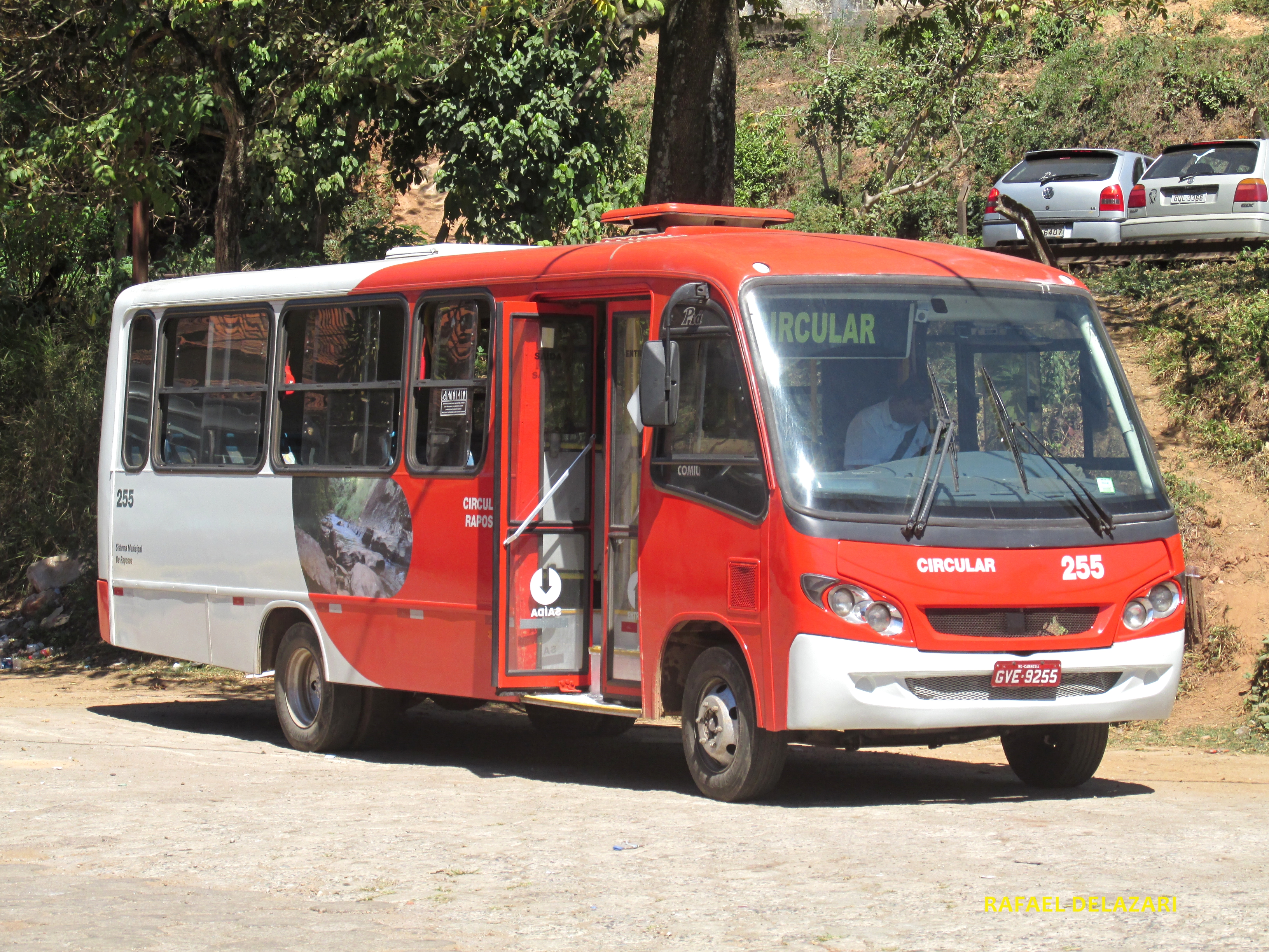 Autotrans - 255